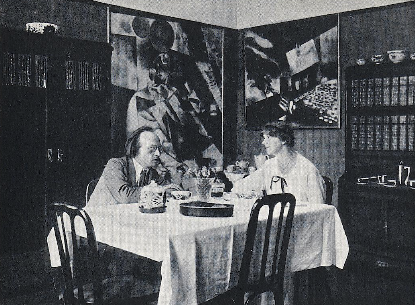 Herwarth und Nell Walden in ihrer Berliner Wohnung, 1916. An den Wänden Bilder von Marc Chagall